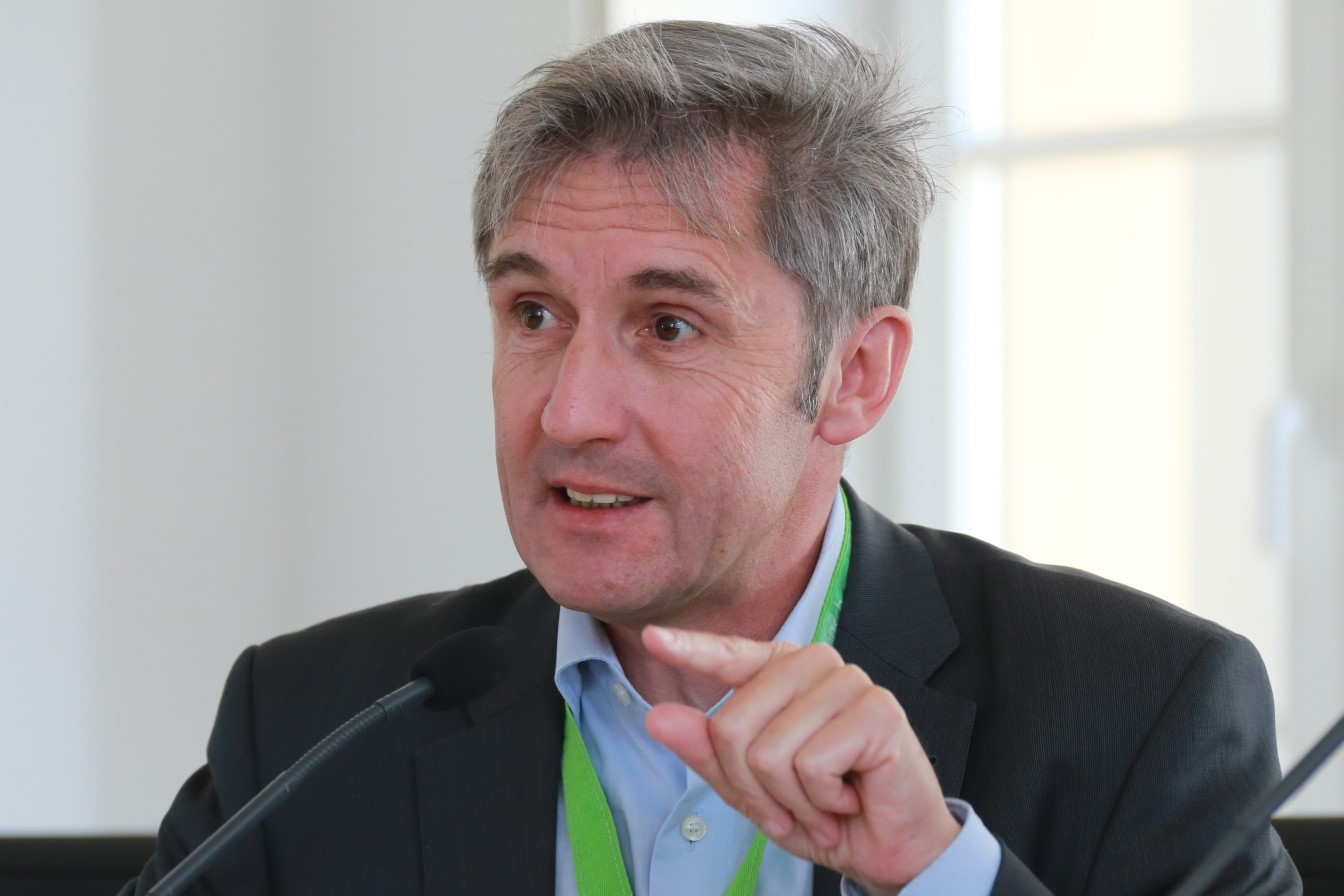 Frank Richter auf einer Veranstaltung im Rahmen des 100. Deutschen Katholikentages